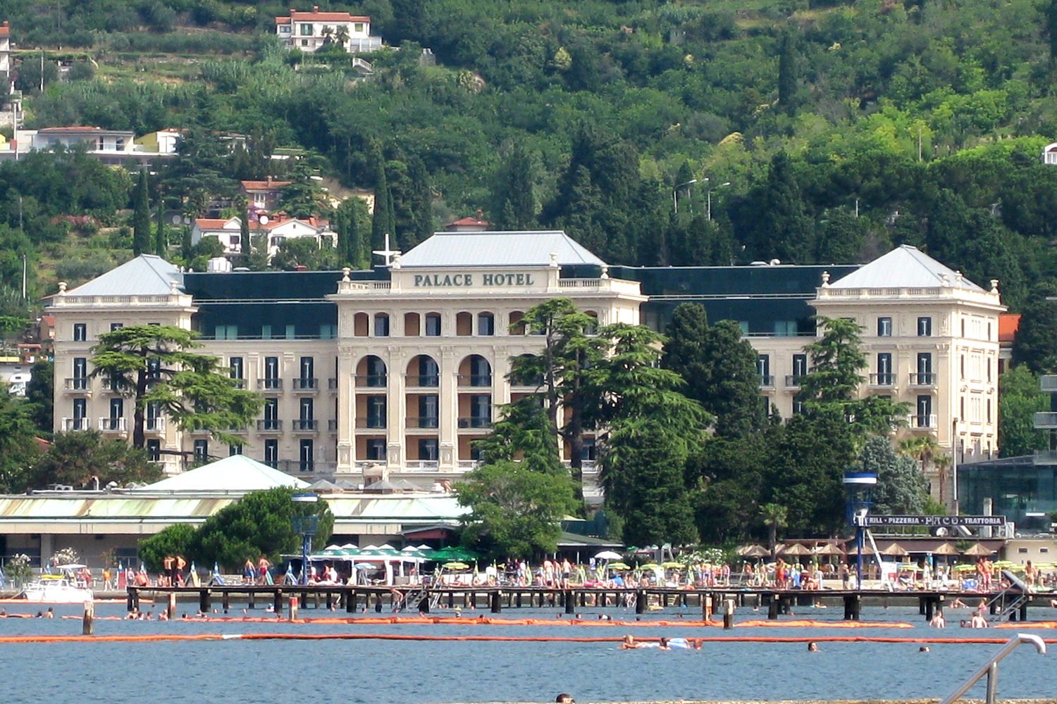 Kempinski Palace Hôtel, Portorož, Piran (Slovenia).